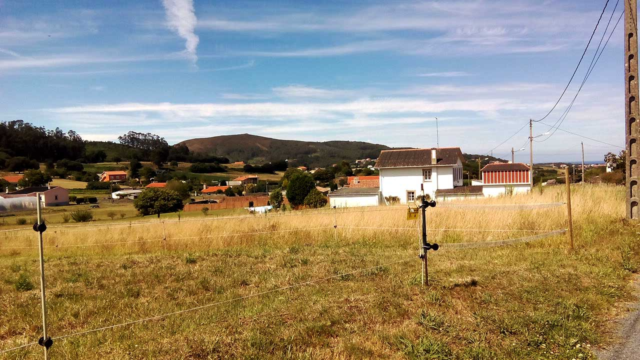 Vista do Casal, O Val.